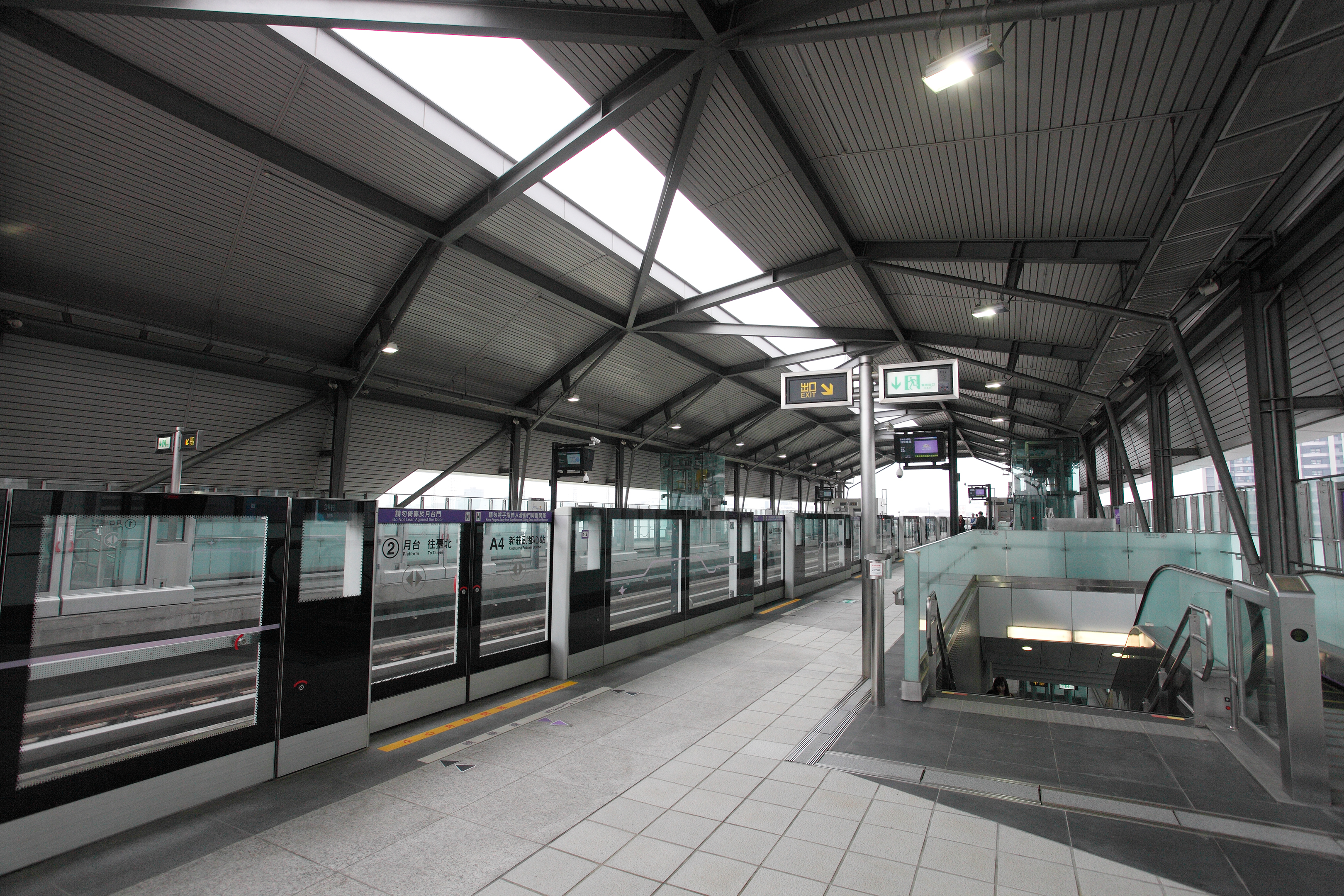 中文（台灣）: 桃園國際機場捷運新莊副都心站第二月台。